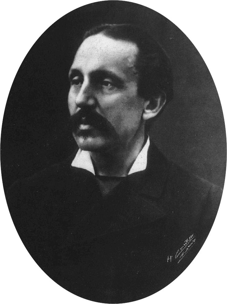 Il politico italiano del XIX secolo Domenico Farini